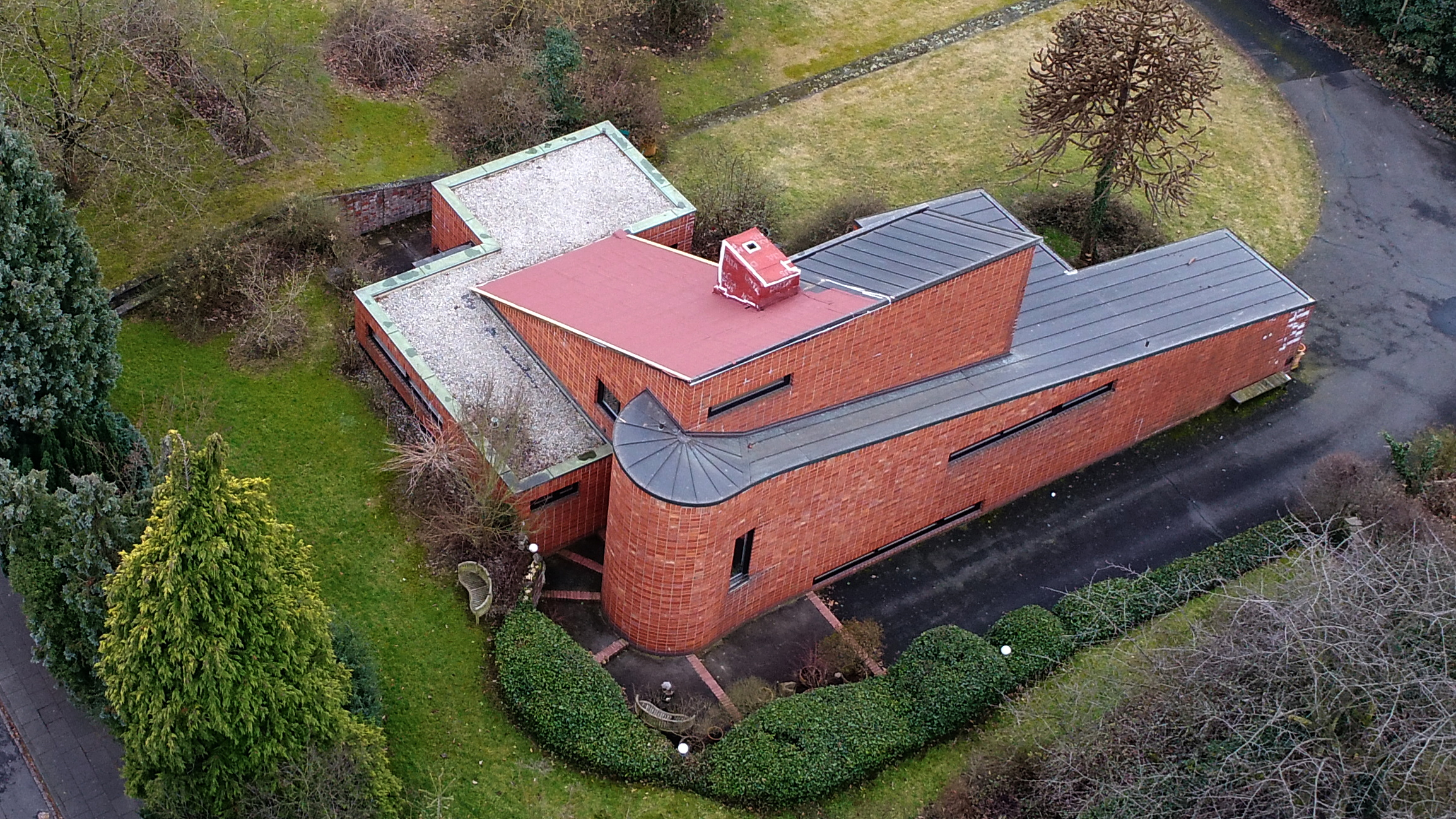 Hennef, Beethovenstr. 5, Architekt Oswald Mathias Ungers, abgerissen am 13.03.2017